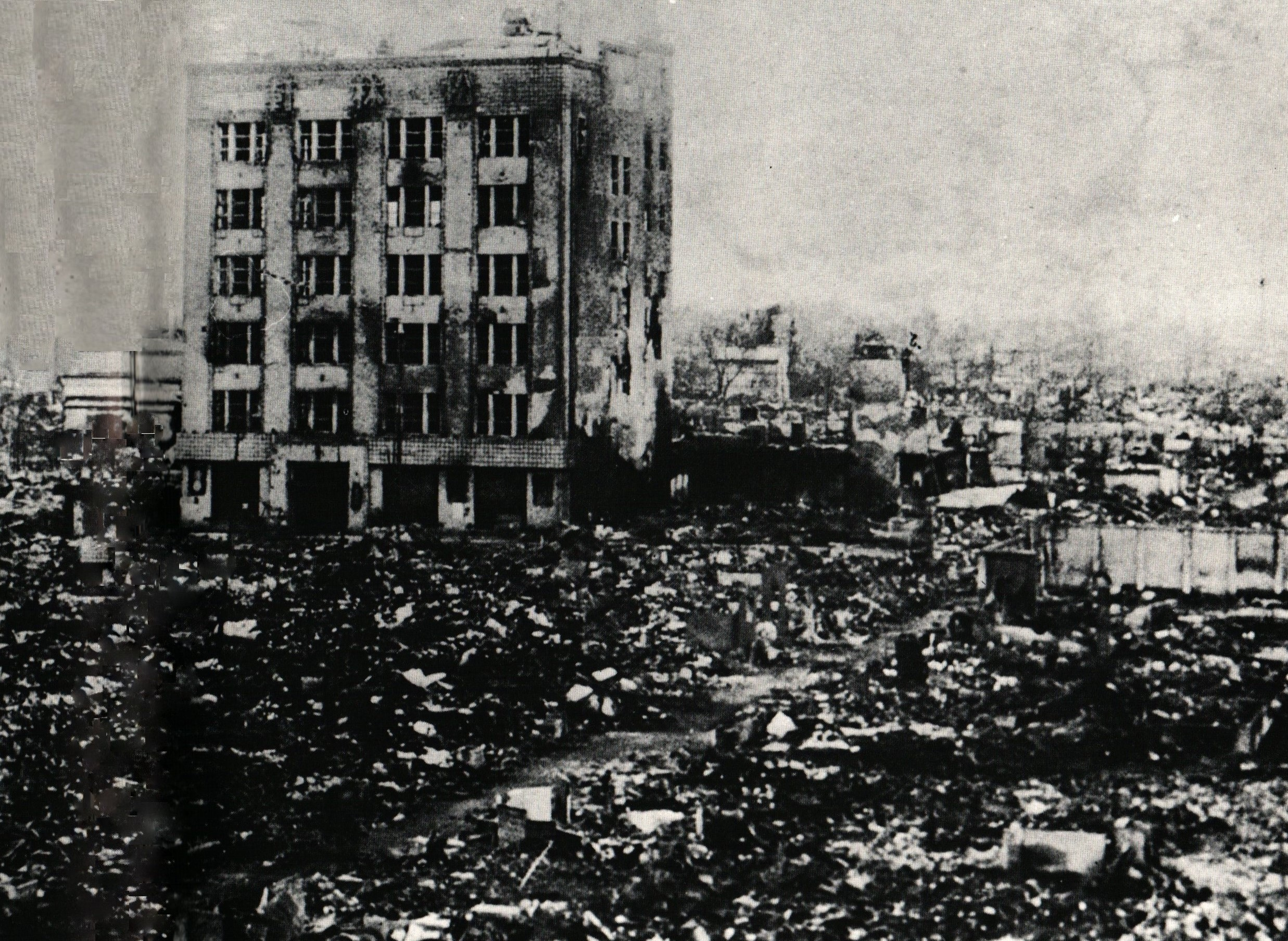 空襲を受けた甲府市街地（昭和20年7月）